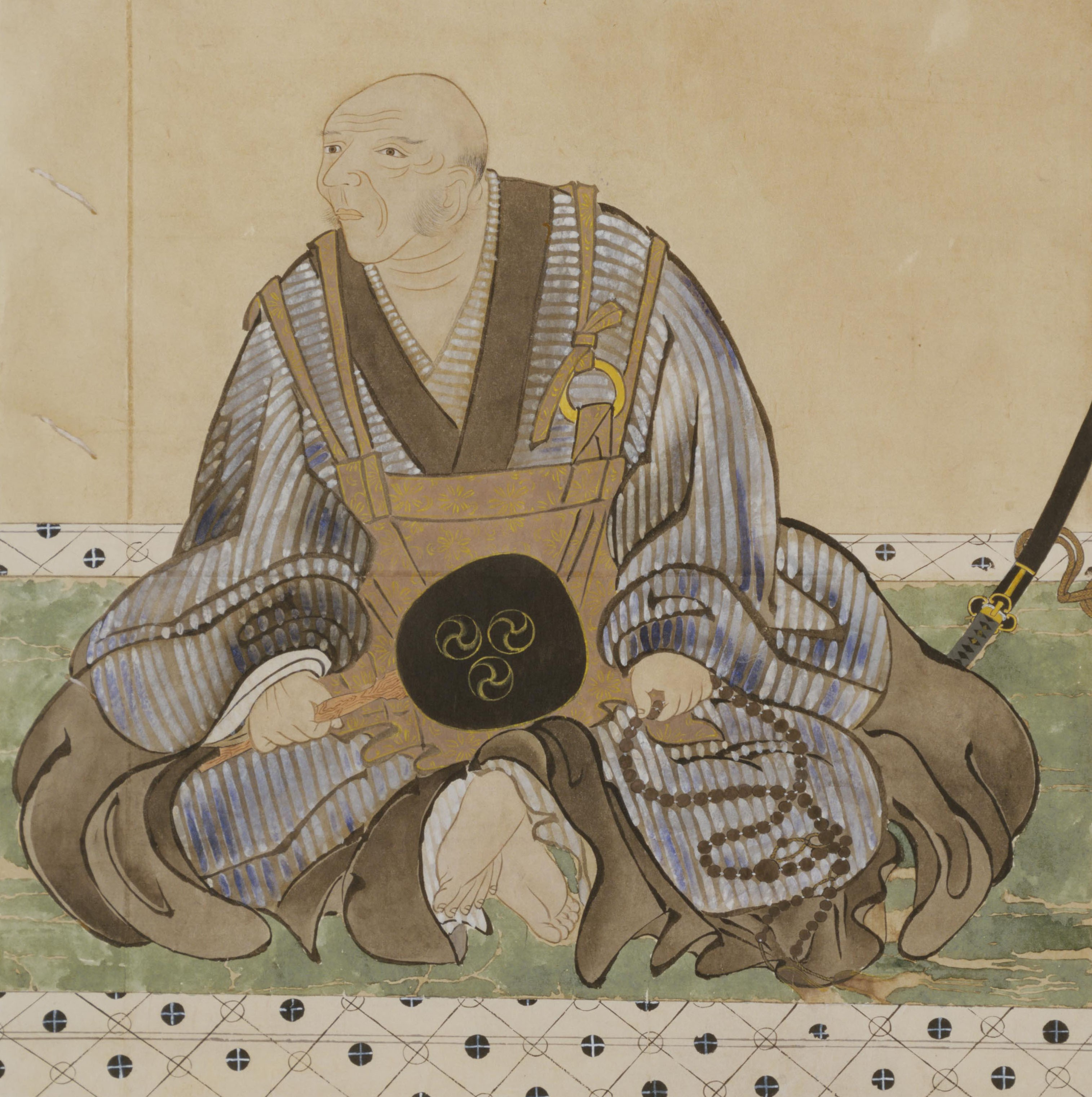 結城晴朝の肖像。